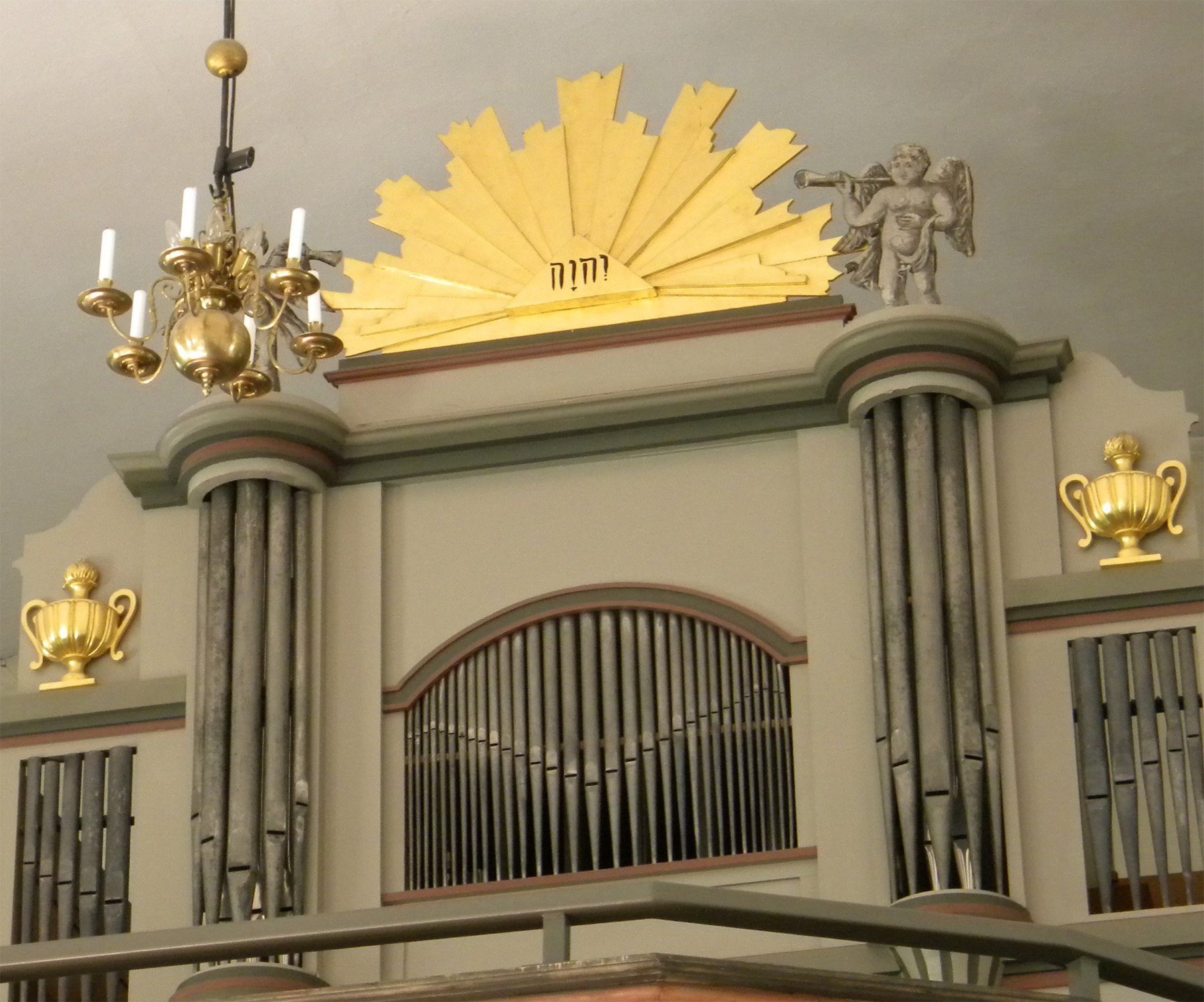 Orgelkrön med tetragrammet JHWH i Styrstads kyrka